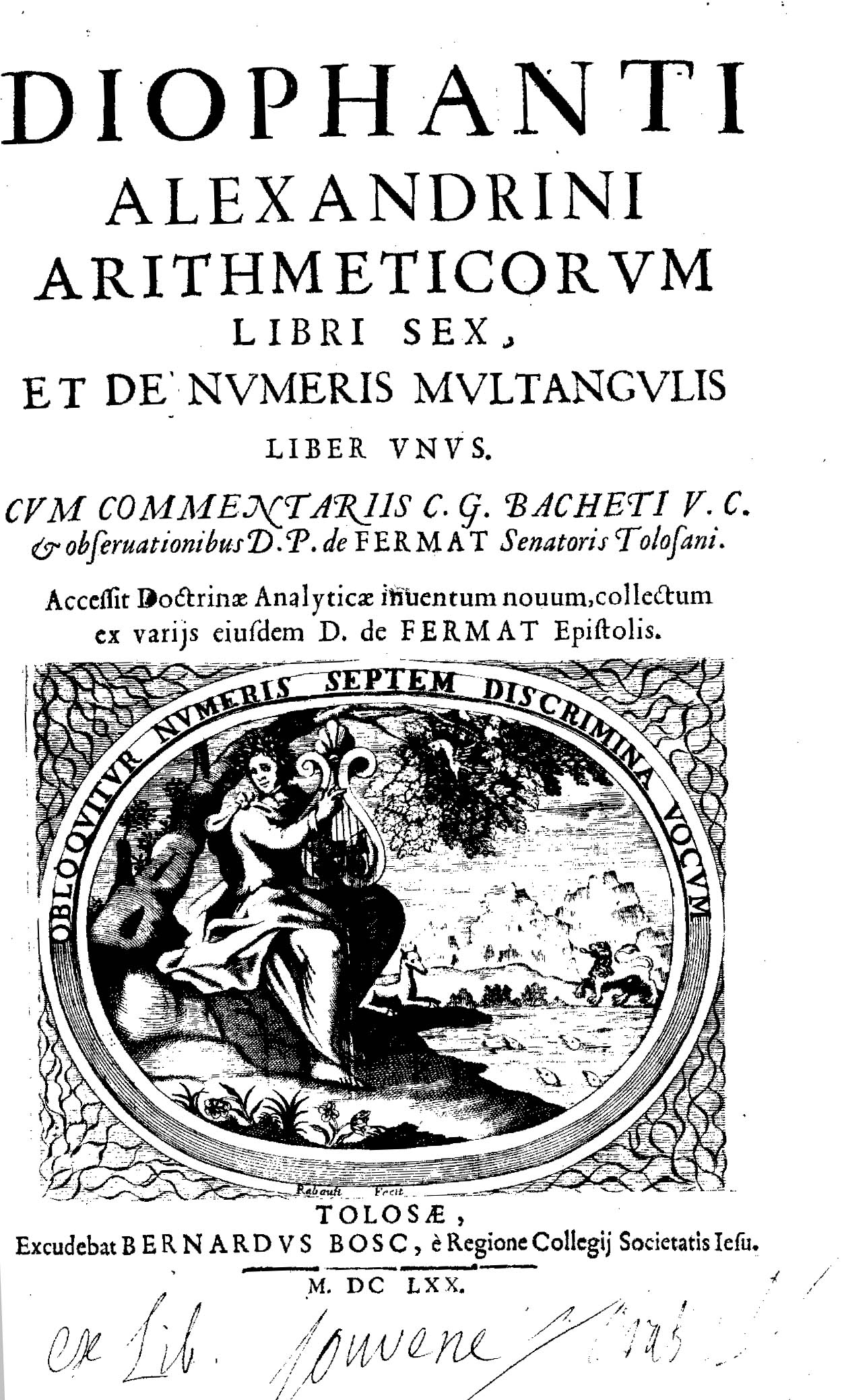 Diophanti Alexandrini Arithmeticorum libri sex, et De numeris multangulis liber unus. Cum commentariis C. G. Bacheti V. C. & obseruationibus D. P. de Fermat senatoris Tolosani. Accessit Doctrinae analyticae inuentum nouum, collectum ex varijs eiusdem D. de Fermat epistolis. - Tolosae : excudebat Bernardus Bosc, è regione Collegij Societatis Iesu, 1670. - [12], 64, 341 [i.e. 343], [1], 48 p. : ill. ; 2°. - Con il testo greco di Diofante; la traduzione latina è di Wilhelm Xylander, cfr. l'epistola al lettore a c. §3v-§4r. - A cura di Samuel de Fermat, il cui nome appare nella dedica .